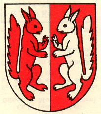 Wappen von Neyruz-sur-Moudon Kanton Waadt Schweiz